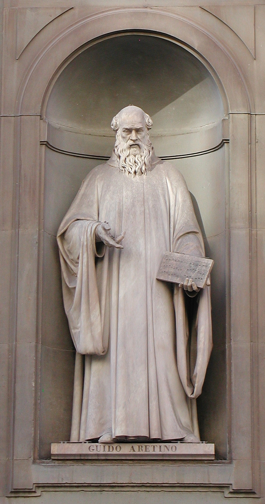 Statua di Guido Monaco (991/992– dopo il 1033), conoscjiuto anche come Guido d'Arezzo o Guido Aretino, è considerato l'ideatore della moderna notazione musicale e del tetragramma, che rimpiazzarono l'allora dominante notazione neumatica.